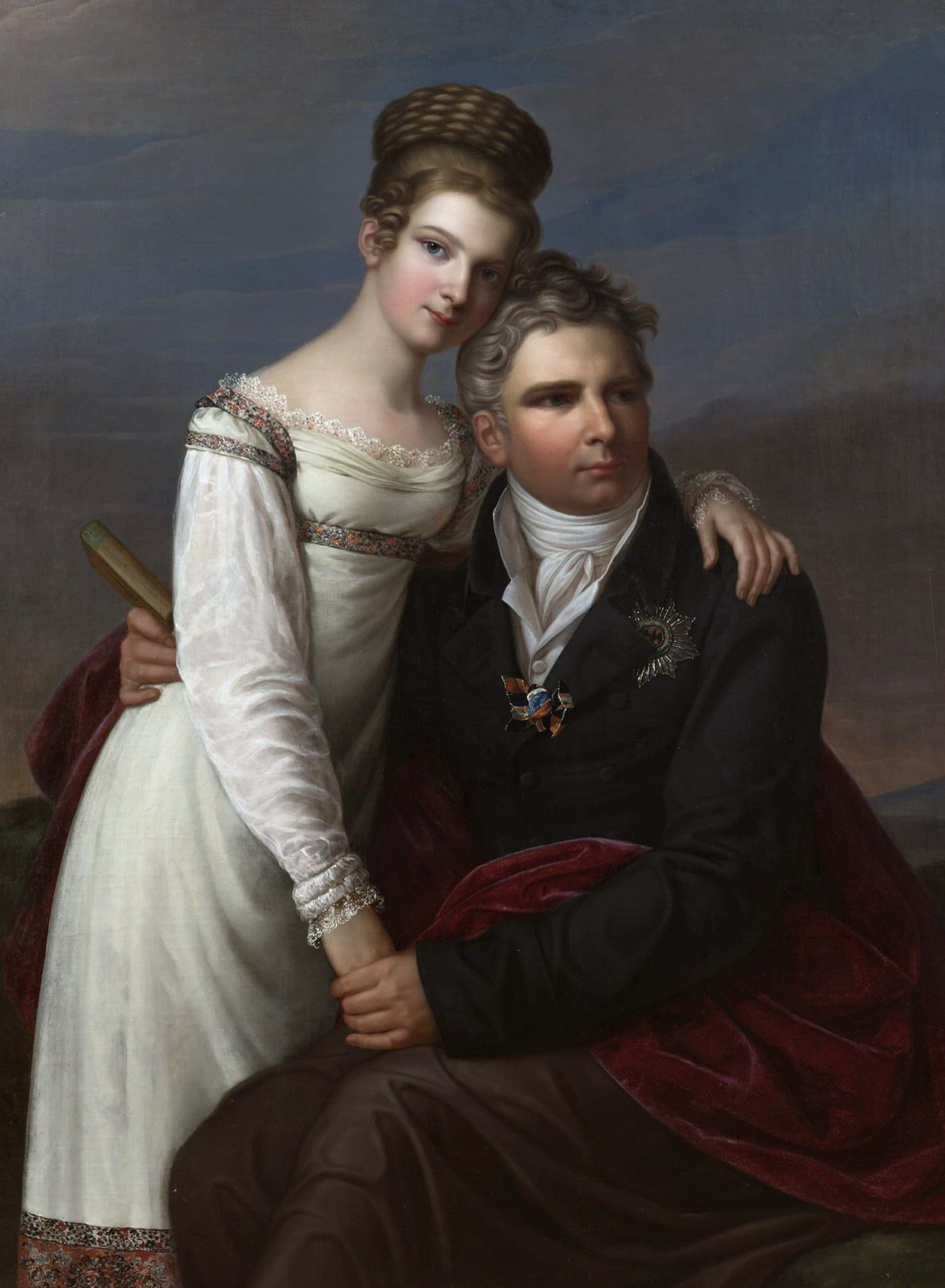 Беларуская (тарашкевіца): Партрэт Антонія Радзівіла (Antoni Radzivił) з дачкой Элізай (Eliza Radzivił)